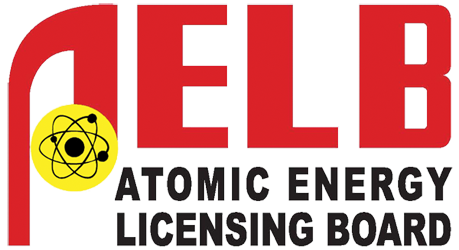 Logo AELB